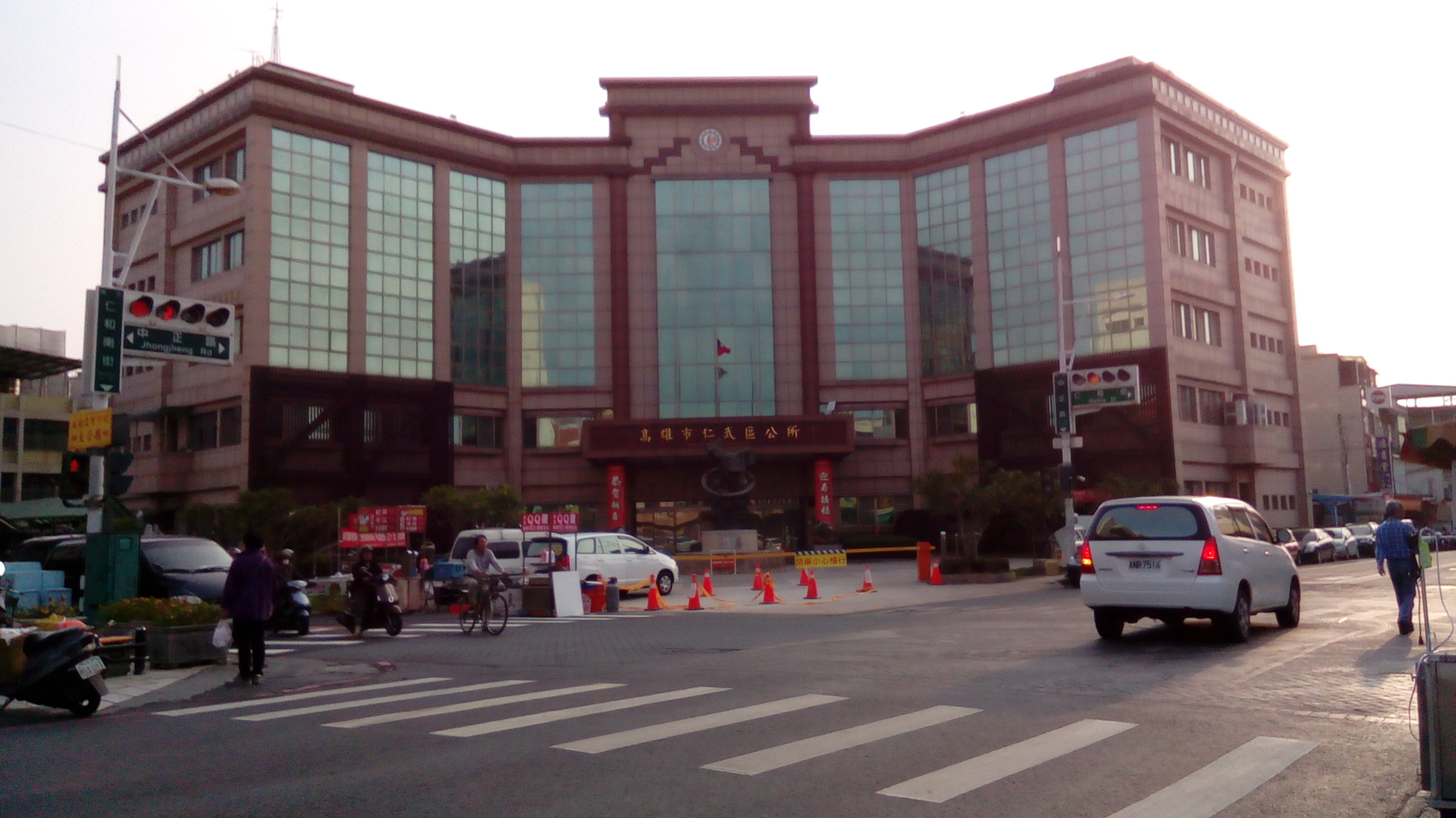 位於中正路與仁和街口 前有仁武夜市